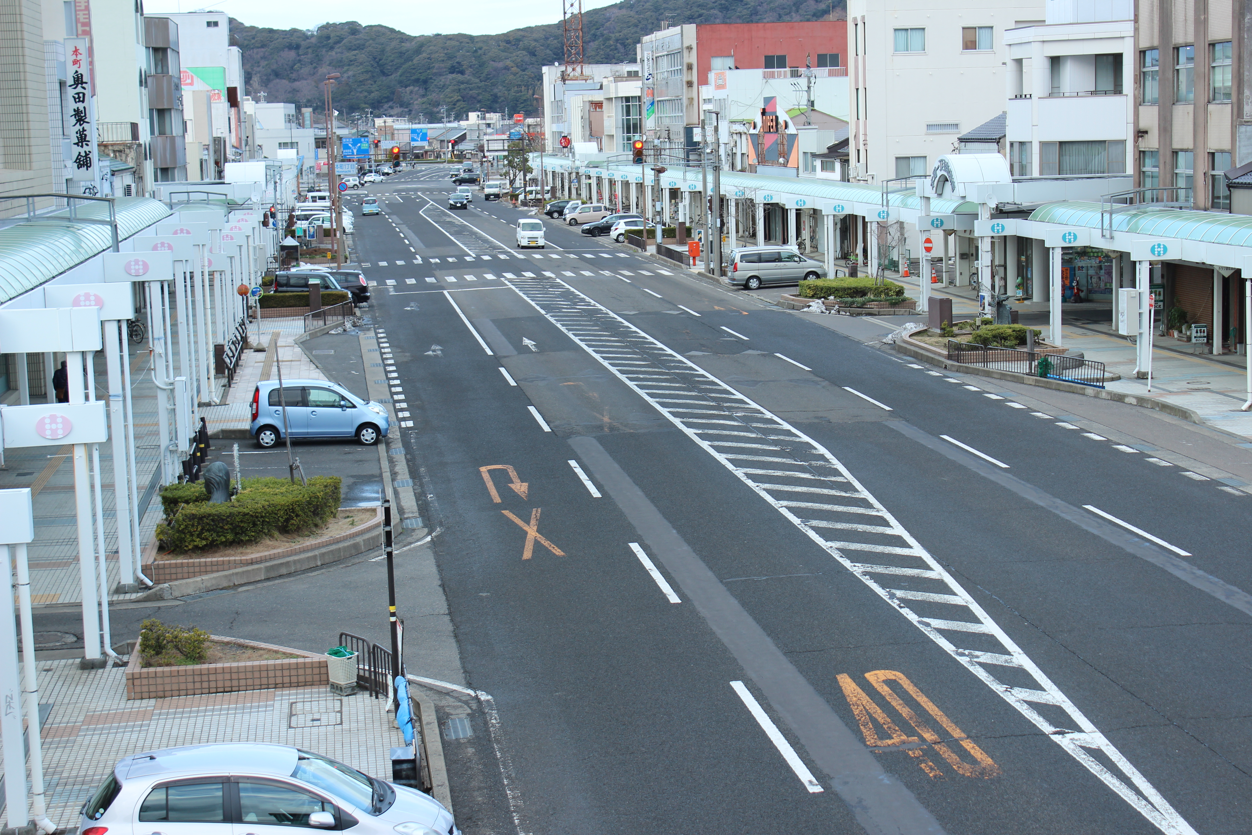 本町1丁目商店街（歩道橋から撮影）